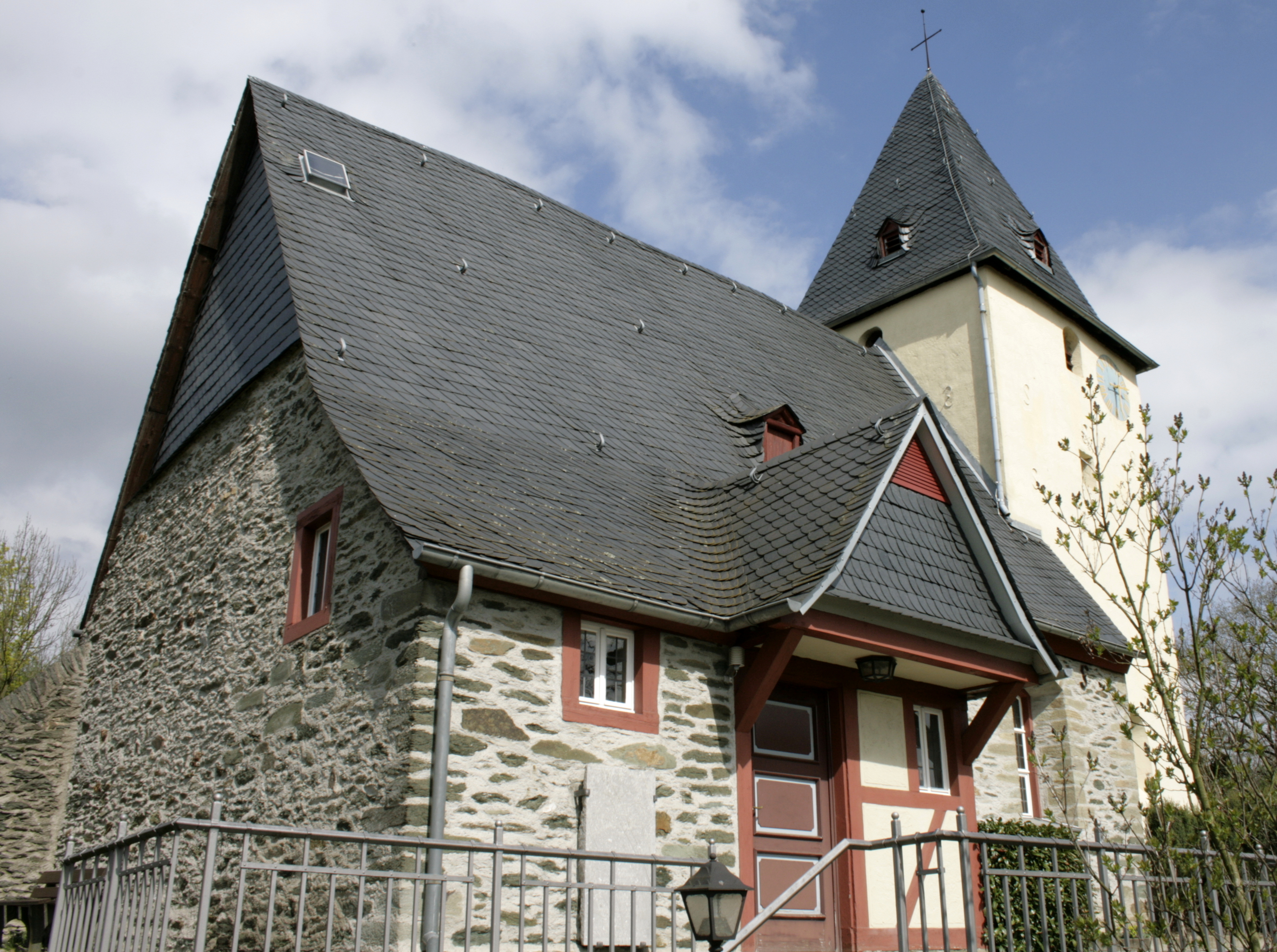 Kirche in Ennerich, Deutschland